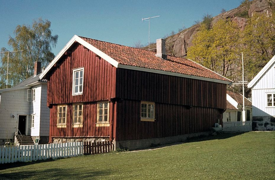 Bentegården i Tønsberg